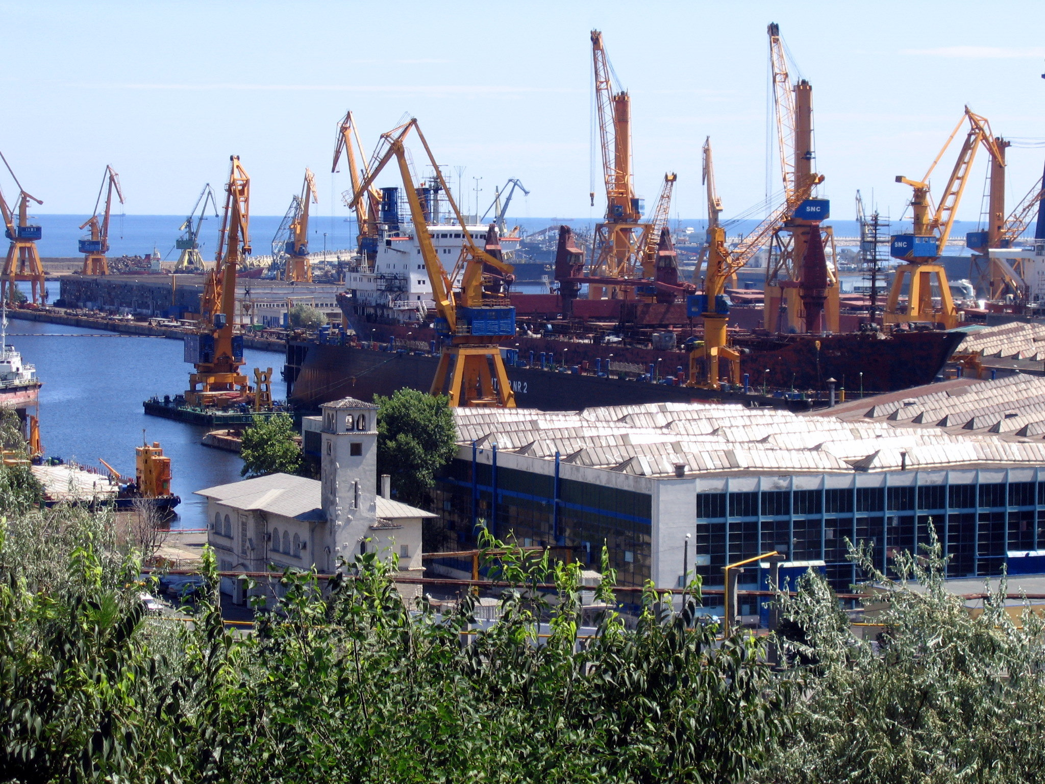 Shipyard in Constanţa (Romania)